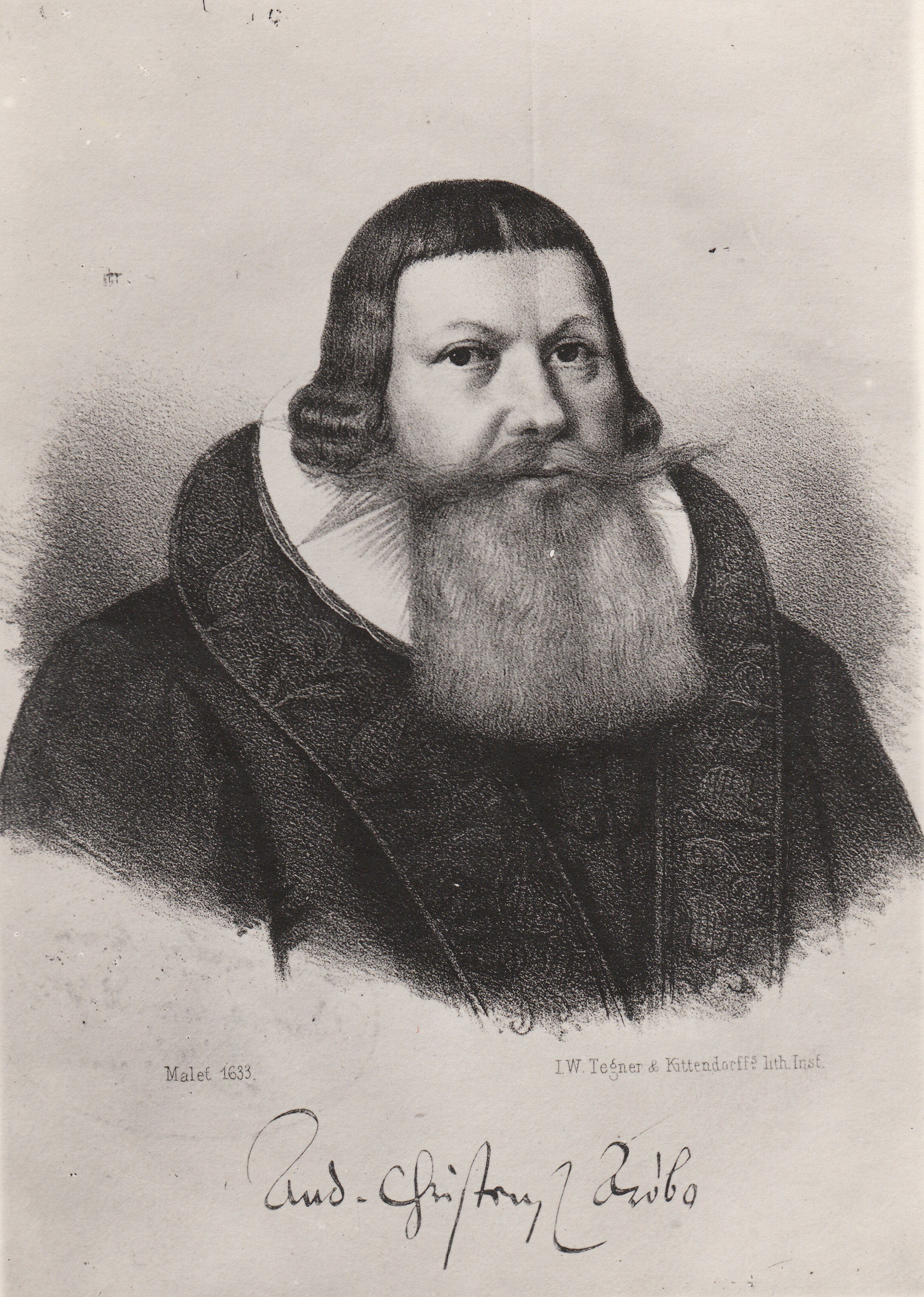 Format: Fotopositiv Wikipedia: Anders Christensen Arreboe Eier / Owner Institution: Trondheim byarkiv, The Municipal Archives of Trondheim Arkivreferanse / Archive reference: Tor.H41.B37.F2749 Superintendent (biskop) i Trondhjem 1618 - 1622, dikter og forfatter. Født 1587 i Æreskøbing, død 1637 i Vordingborg, Danmark. Skrev blant annet "Hexaemeron rhytmico-danicum" Se Det Kongelige Bibliotek: Utstillingstekst i Trondhjems 900 Aars Jubilæum: Katalog for Den Historiske Udstilling i Trondhjem 1897: 371. Arreboe, Anders Christensen, f. 1587 paa Ærø, hvorefter han tog sit Tilnavn, d. 1637, Biskop i Trondhjem 1618 - 1622. I 1622 blev han paa en Herredag i Bergen fradømt sit Embede. Boede derefter i Malmø, indtil han i 1626 blev Sognepræst i Vordingborg. Berømt som Digter, og anseet som den danske Digtekunsts Fader. OM., Knæstykke i fuld Størr., Sign.: Ætatis:47: Anno: 1633: *Domkirken. Anders Christenssøn Arrebo, født 1587, død 1637, dansk dikter. Ble 31 år gammel biskop i Trondheim, hvor han ved sin utfordrende atferd skaffet seg mange uvenner, og 1622 ble han dømt fra embetet. Fra 1626 sogneprest i Vordingborg. Hans hovedverk er diktet Hexaëmeron, en fri bearbeidelse av franskmannen du Bartas' dikt om skapelsesuken, La semaine. Hele det lærde mytologiske apparat er her tatt med. I første dag bruker Arrebo dobbeltrimede heksametre, de andre dagene er skildret i aleksandrinere, som Arrebo innfører i dansk litteratur. Hvor han står på egne ben (som i skildringene fra Norge), når han ofte virkelig poetisk flukt, mens han ellers er aldeles avhengig av sitt forbilde. Verket, som i sitt stilpreg er karakteristisk for barokk-tiden, utkom først 1661. Et særlig metrisk betydelig arbeid er også hans oversettelse av Salmenes bok: K(ong) Davids psalter sangvis udsat (1623), som især ble godt likt i Norge. Samlede Værker i 5 bd. 1966–84. Kilde: Store Norske Leksikon, artikkelforfatter Mogens Brøndsted.